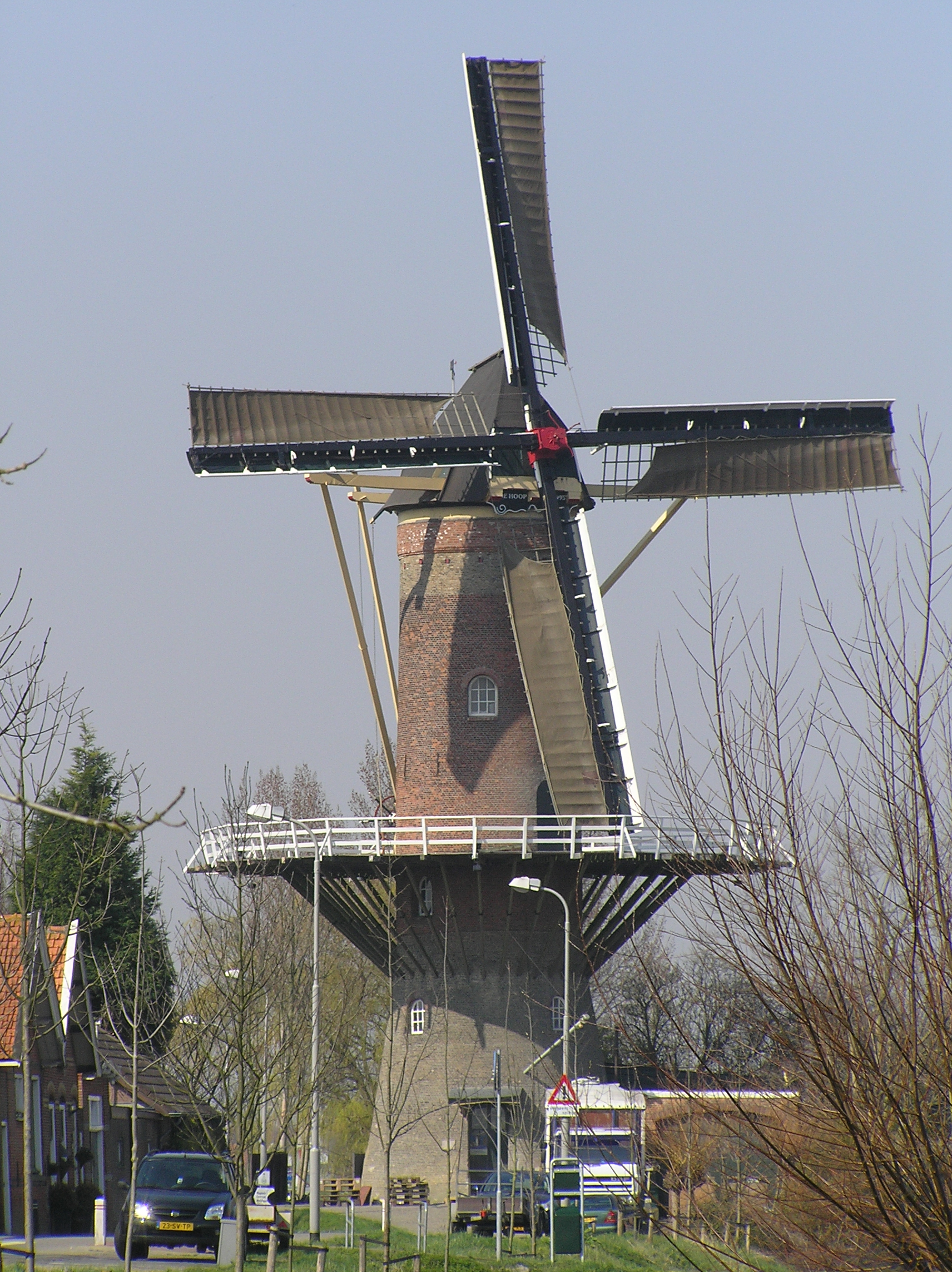 Windmill de Hoop in Wolphaartsdijk